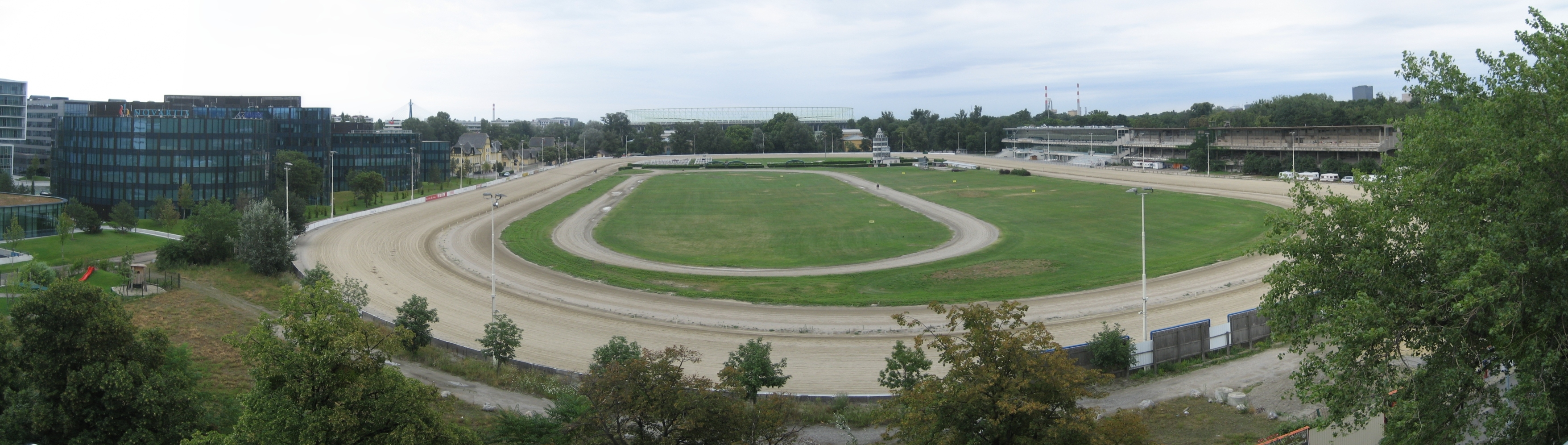 die Trabrennbahn Krieau in Wien Leopoldstadt; Panoramabild erstellt mit der Demoversion von Autostitch 2.2 (hier erhältlich: NOTE: This image is a panorama consisting of multiple frames that were merged in software. As a result, this image necessarily underwent some form of digital manipulation. These manipulations may include blending, blurring, cloning, and color and perspective adjustments. As a result of these adjustments, the image content may be slightly different than reality at the points where multiple images were combined. This manipulation is often required due to lens, perspective, and parallax distortions.